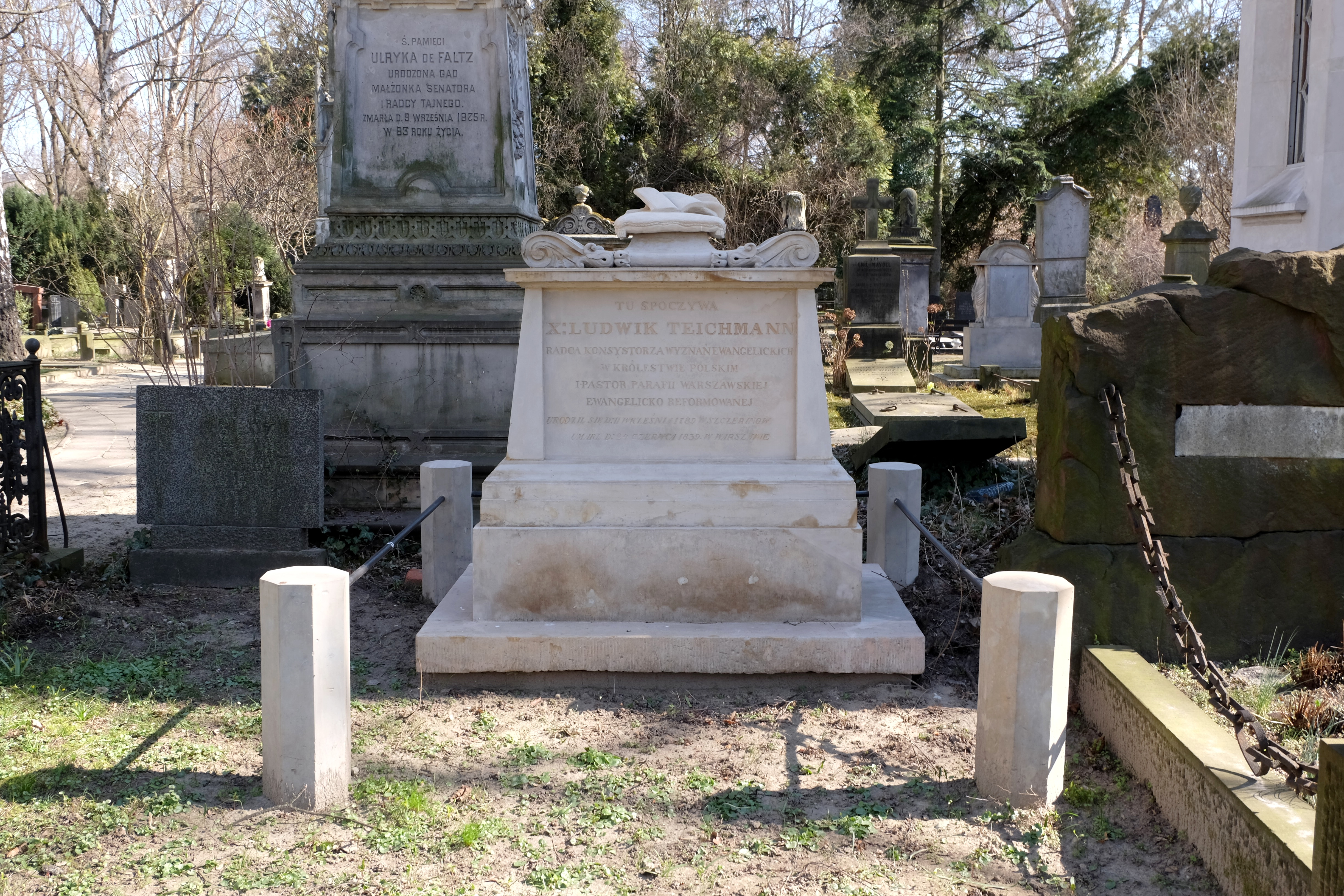 Grób superintendenta generalnego Kościoła Ewangelicko-Reformowanego w Królestwie Polskim - Fryderyka Jakuba Teichmanna na cmentarzu ewangelicko-reformowanym przy ul. Żytniej w Warszawie